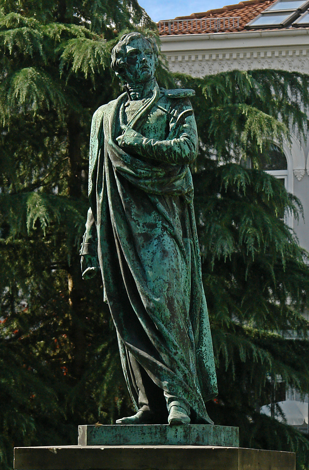 Theodor-Körner-Denkmal in Bremen, Körnerwall.Das abgebildete Objekt ist ein geschütztes Kulturdenkmal in der Freien Hansestadt Bremen, mit der Nr. 0691 beim Landesamt für Denkmalpflege registriert.